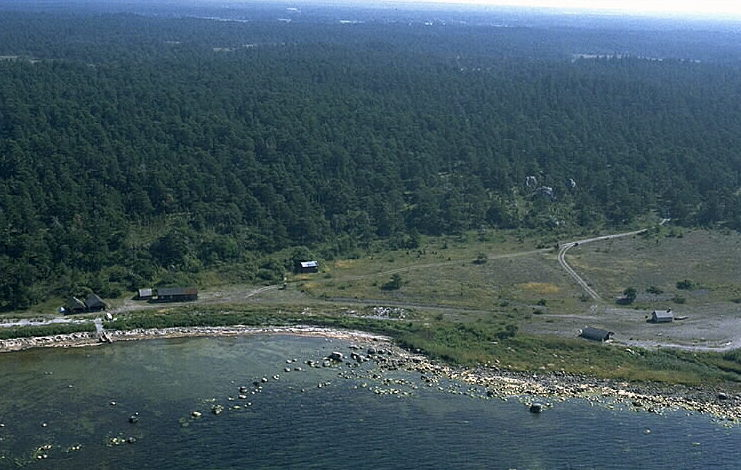 Motiv: Sigarvestrand fiskeläge Nyckelord: Flygbilder, Riksintressen Kategori: FiskelägeSigarvestrand fiskeläge